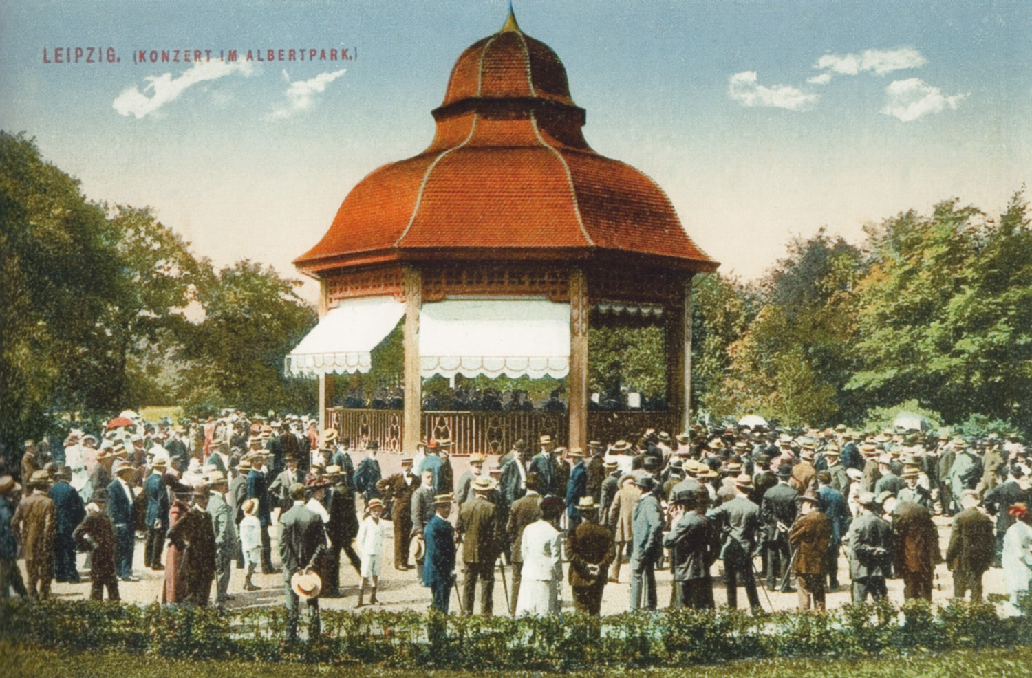 Konzert am Musikpavillon im König-Albert-Park in Leipzig um 1915